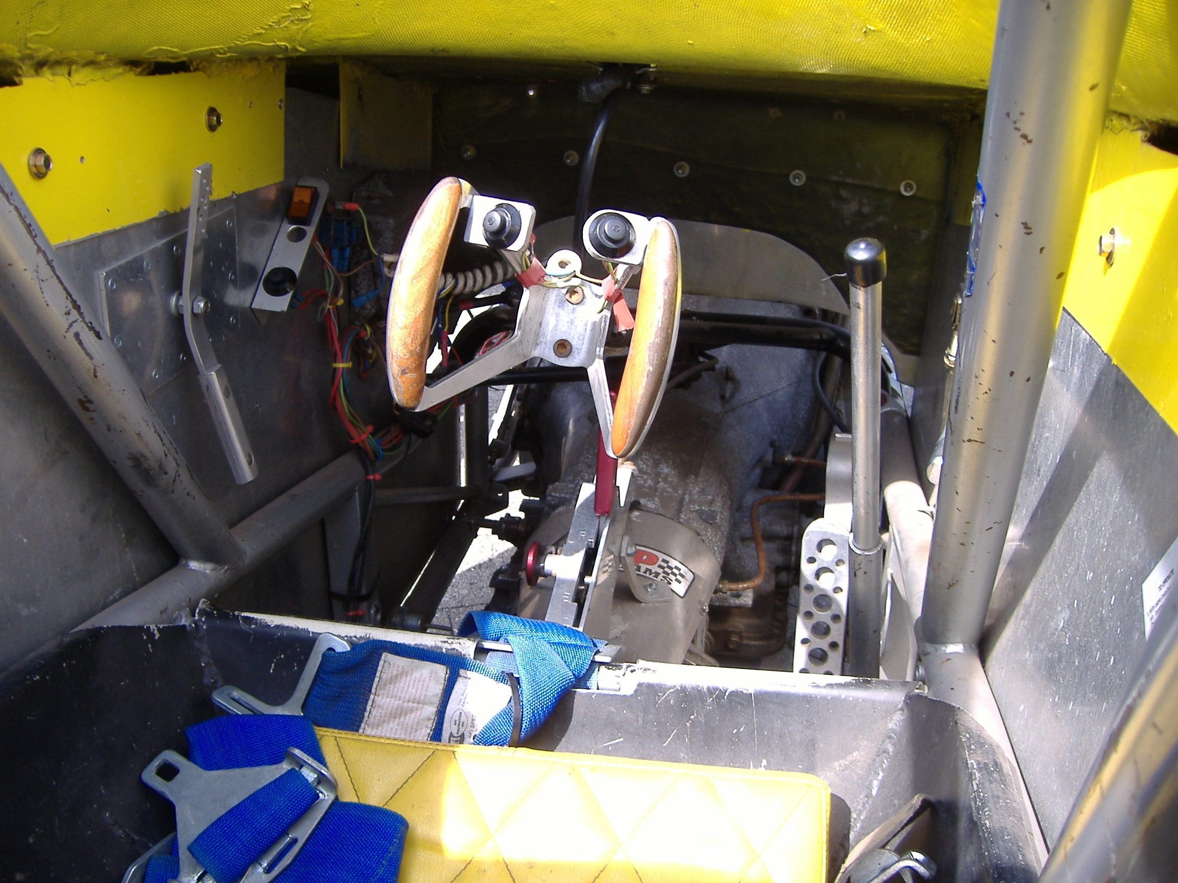 Cockpitansicht